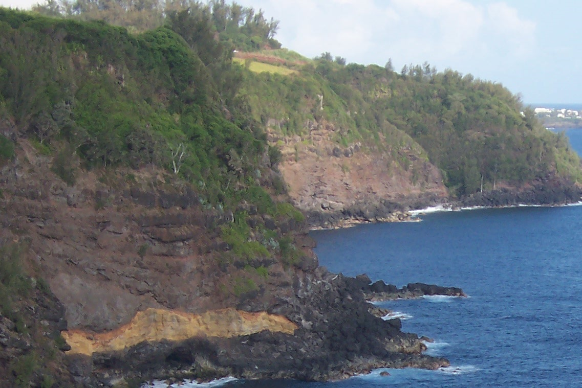 Falaises basaltiques entre le cap de Grande Anse et le cap de Petite-Île sur l'île de La Réunion avec présence de couches intercalées de palagonite